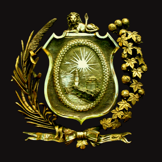 Brasão oficial em bronze, escultura de Jobson Figueiredo.